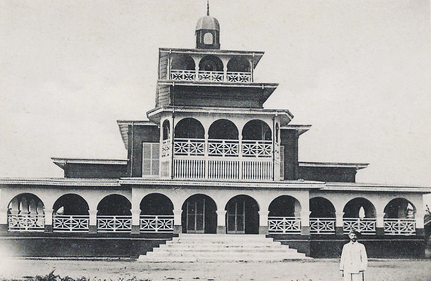 Duala. Palast von King "Mango Bell". [carte postale recadrée] pas de mention d'auteur, d'éditeur ou de date